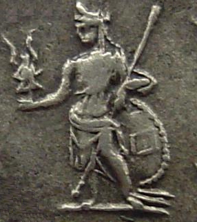 détail d'une pièce de monnaie romaine représentant la Vénus Victrix tenant un casque de la main droite et une lance et un bouclier de la main gauche (Antoninien - III° siècle).